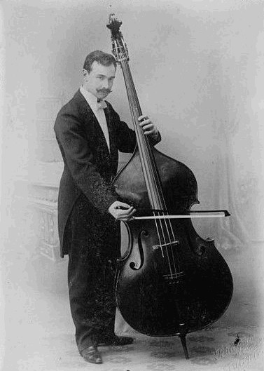 František Simandl (1840-1912), česko-rakouský kontrabasista a hudební pedagog